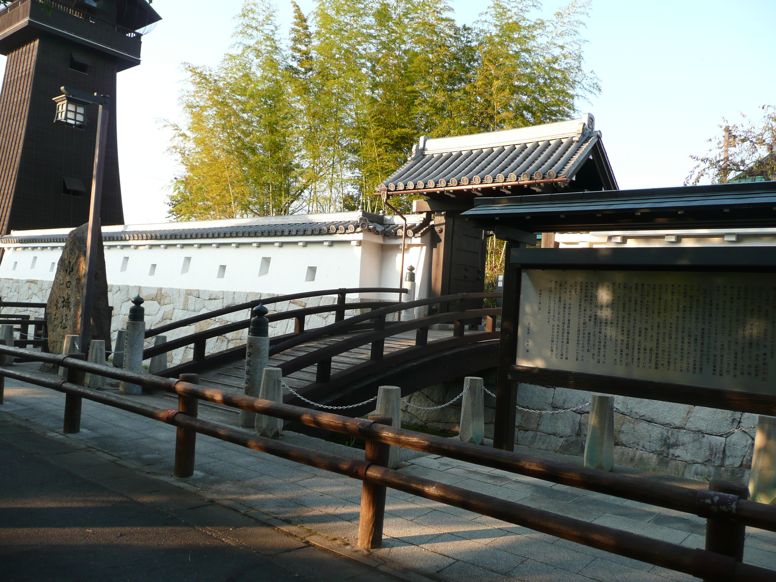 小口城の石碑